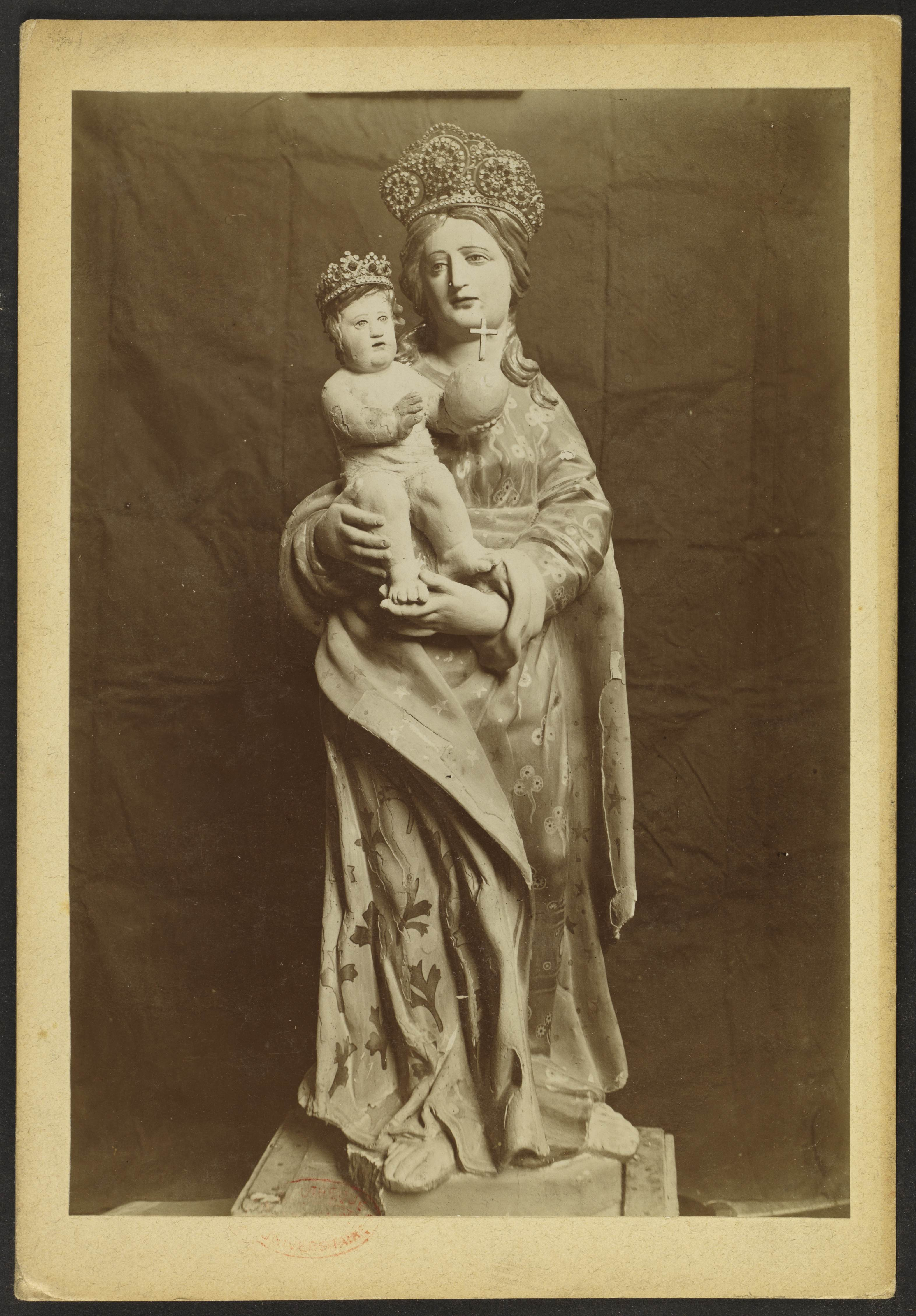 Eglise Saint-Martin de Génissac; Statue de la Vierge (XVIIIe)